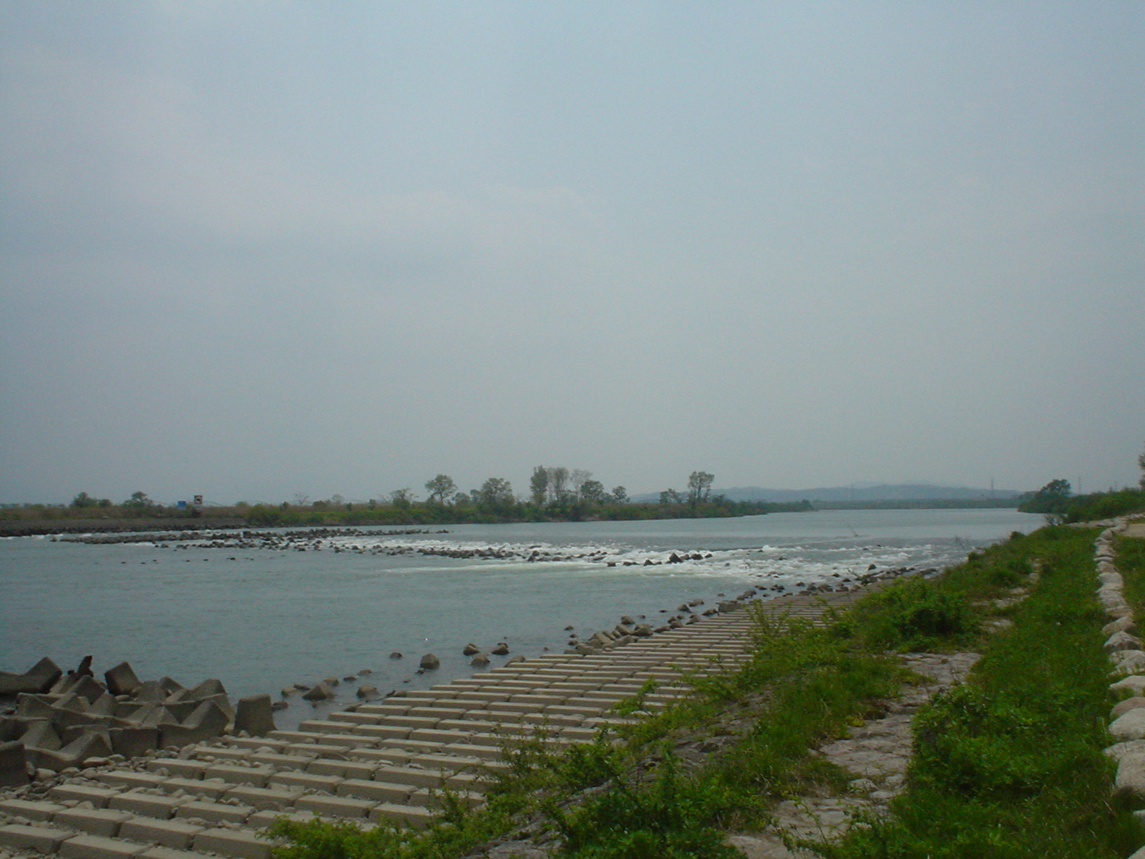 Agano River in Niigata, Japan.ja: 阿賀野川（新潟県新潟市江南区沢海 阿賀野川床固め公園より上流方向撮影）